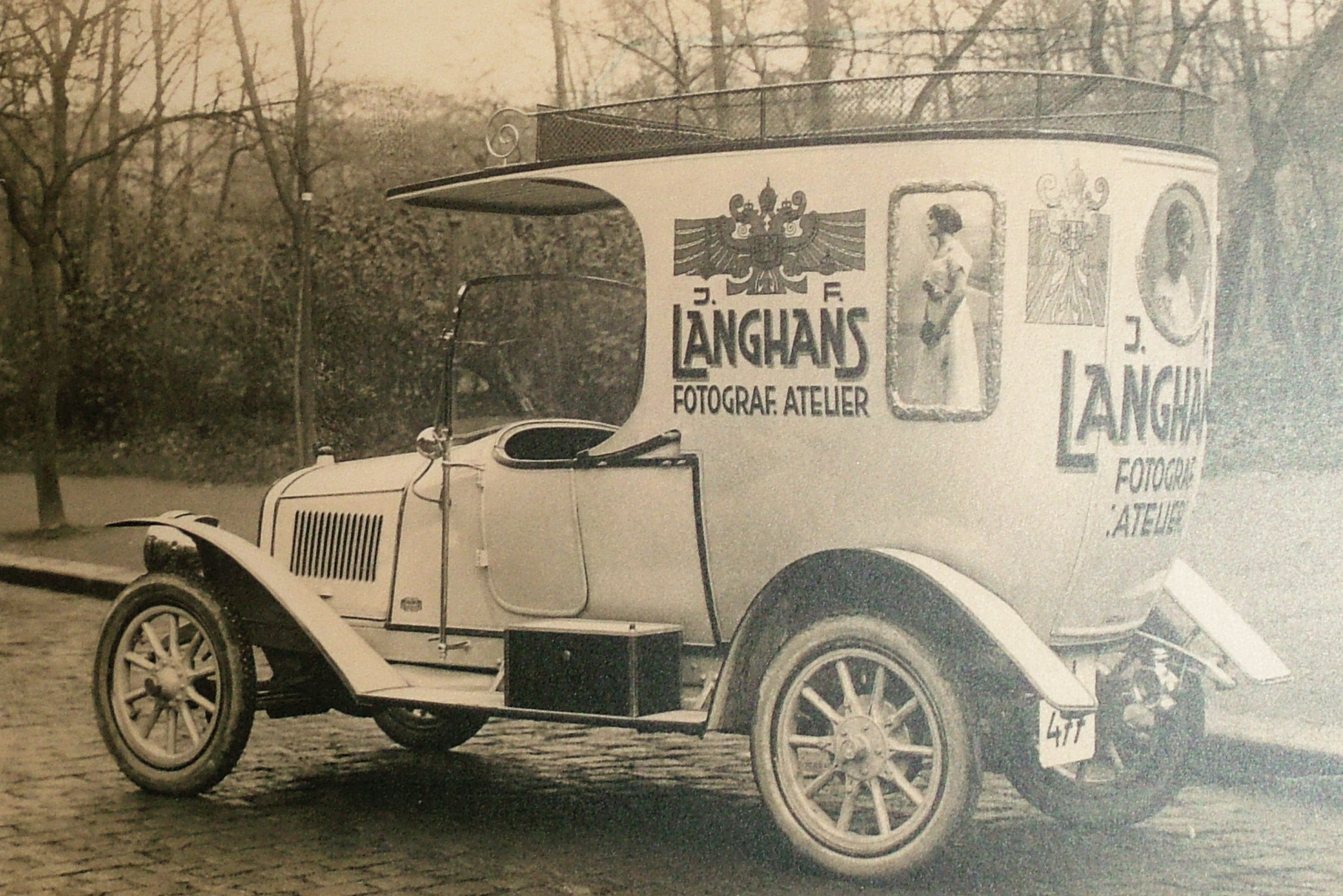 Fotografie z výstavy v Galerii Langhans, Praha Automobil firmy a fotografického ateliéru Langhans.